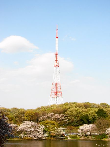 三ッ池公園。神奈川県横浜市鶴見区。2007年4月5日、投稿者が撮影。